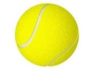 Optik sarı tenis topu